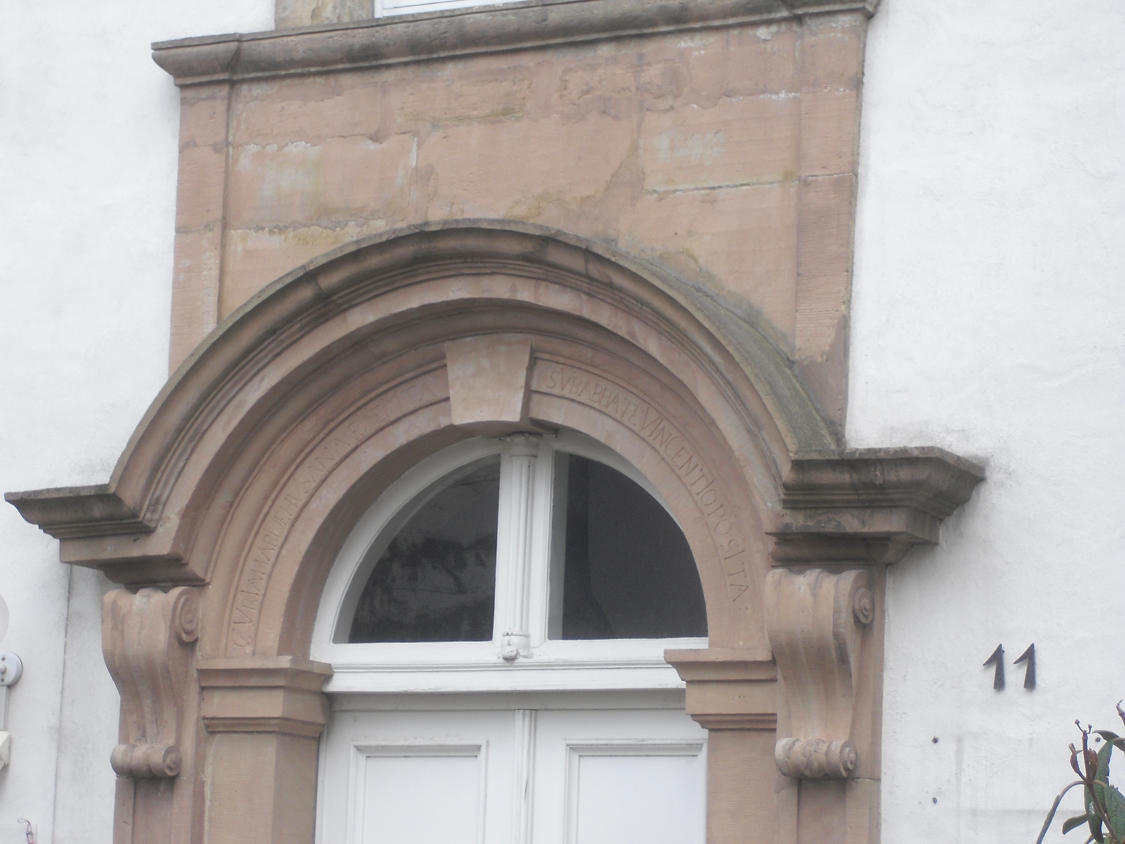 Chronogramm (1734) am Portal des Hardehauser Hofs in Paderborn Inschrift